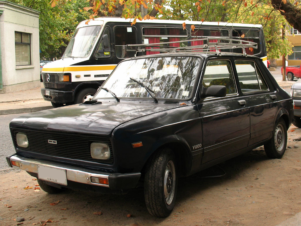 Yugo Skala 55 1.1 1989